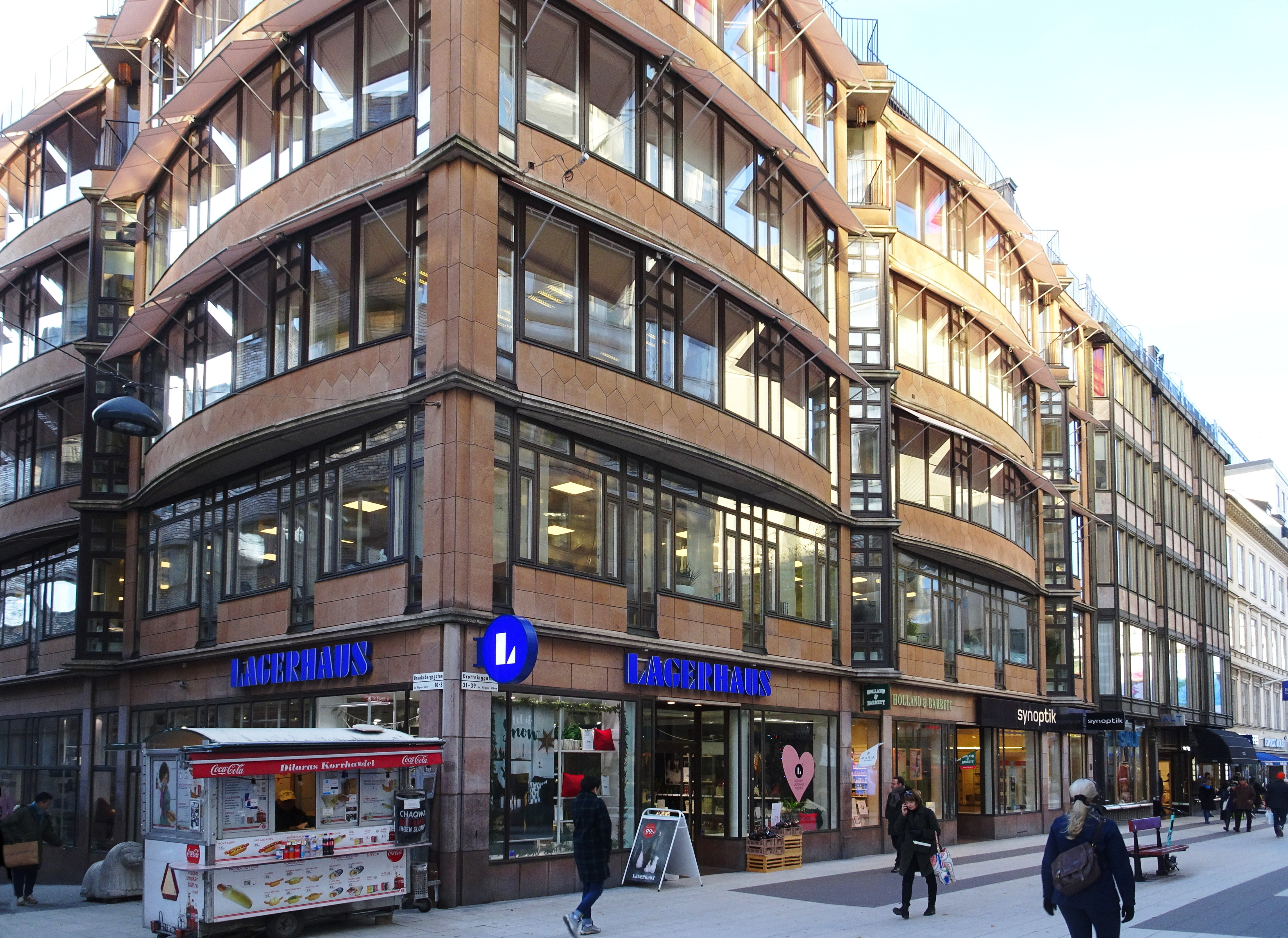 Klarahuset, Drottninggatan / Brunkebergsgatan. Nyréns Arkitektkontor och uppfördes 1986-1989.